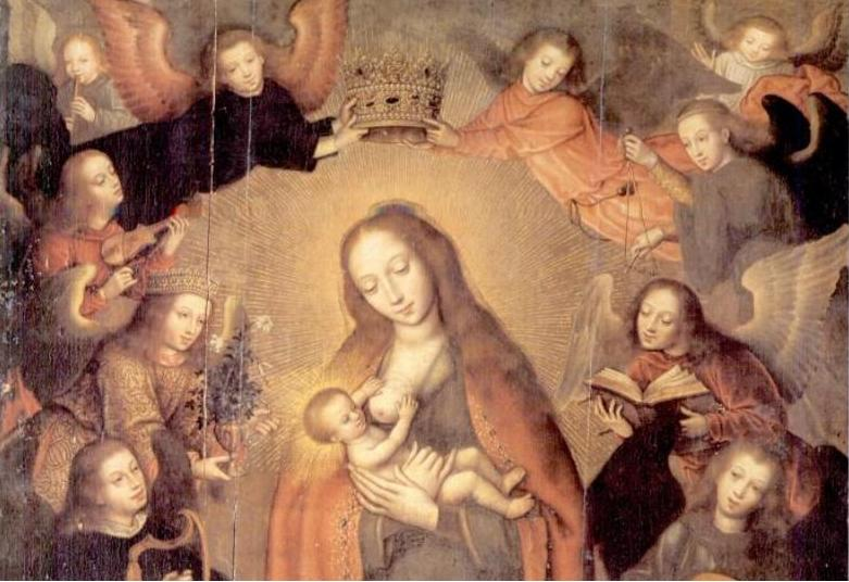 Virgen de Belen (fragment).